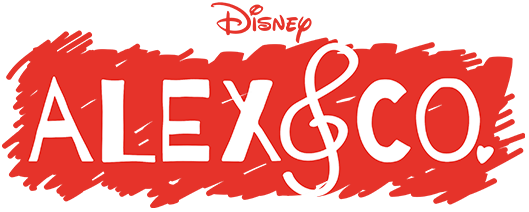 Logotipo de Alex & Co.